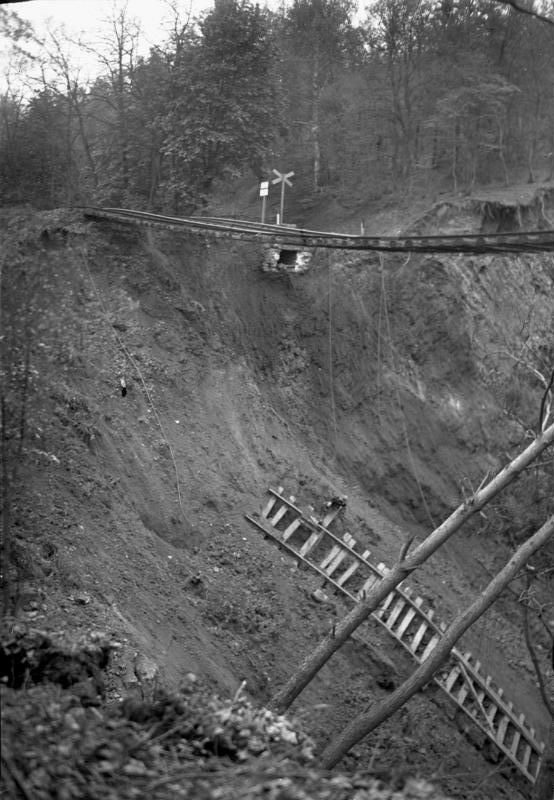 Die grosse Erdrutsch-Katastrophe in Vienenburg! Blick in den 70 m tiefen Krater. Eine Eisenbahnschiene ist mit in die Tiefe gerissen worden, die andere hängt in der Luft. Das Unglück wäre unübersehbar gewesen, wenn ein Schnellzug die Strecke im Moment des Erdrutsches passiert hätte.